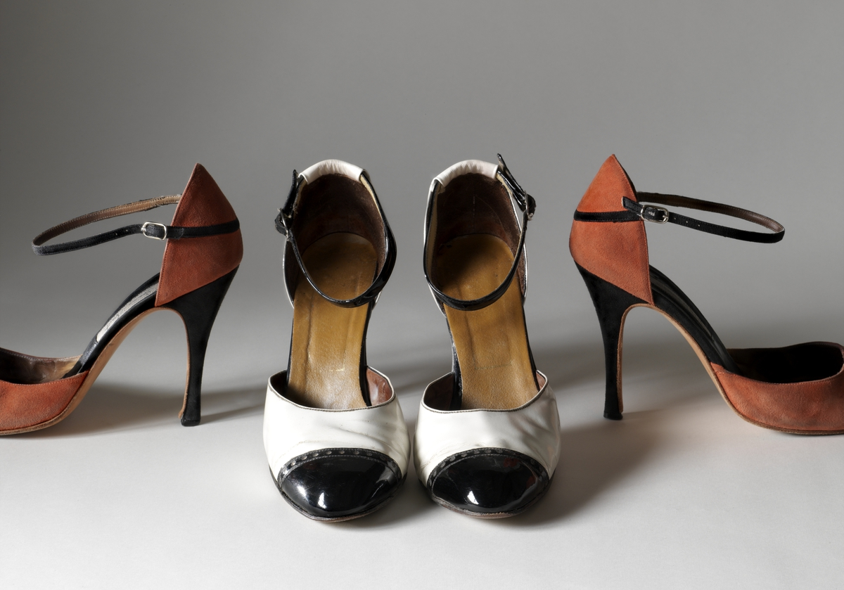 Tangoskor. Ett par damskor i ljusbrun mocka med hög klack, öppen tå och svart vristrem samt ett par högklackade damskor, vita med svart tå och vristrem.